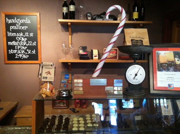 Handgjord Polkapokal av Gränna glashytta (Polkapokal från Gränna glashytta)